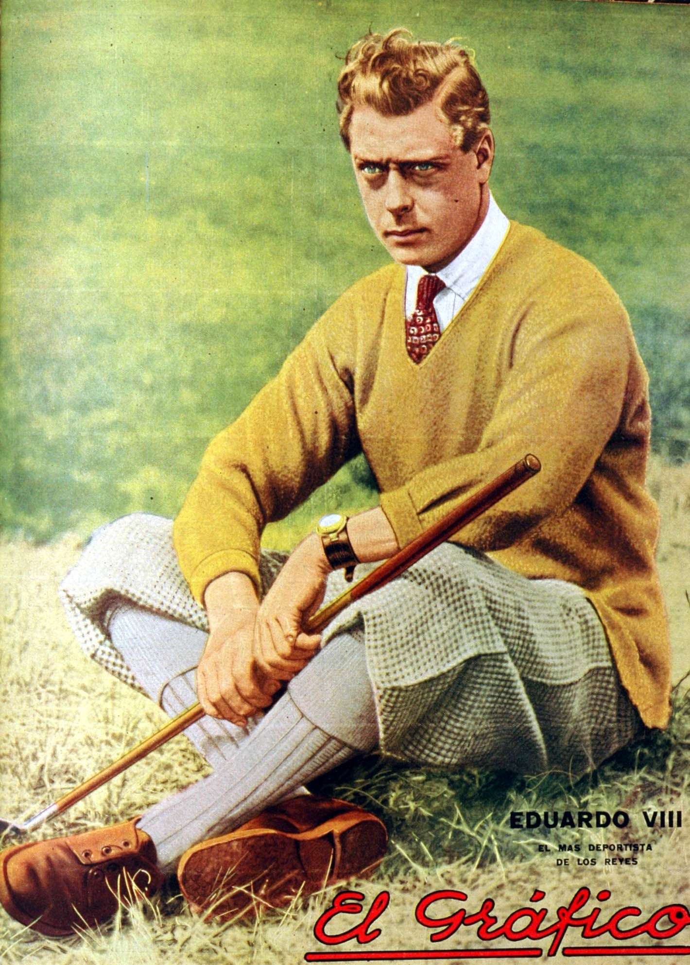 El Grafico del 08 de Febrero de 1936. Edicion 865